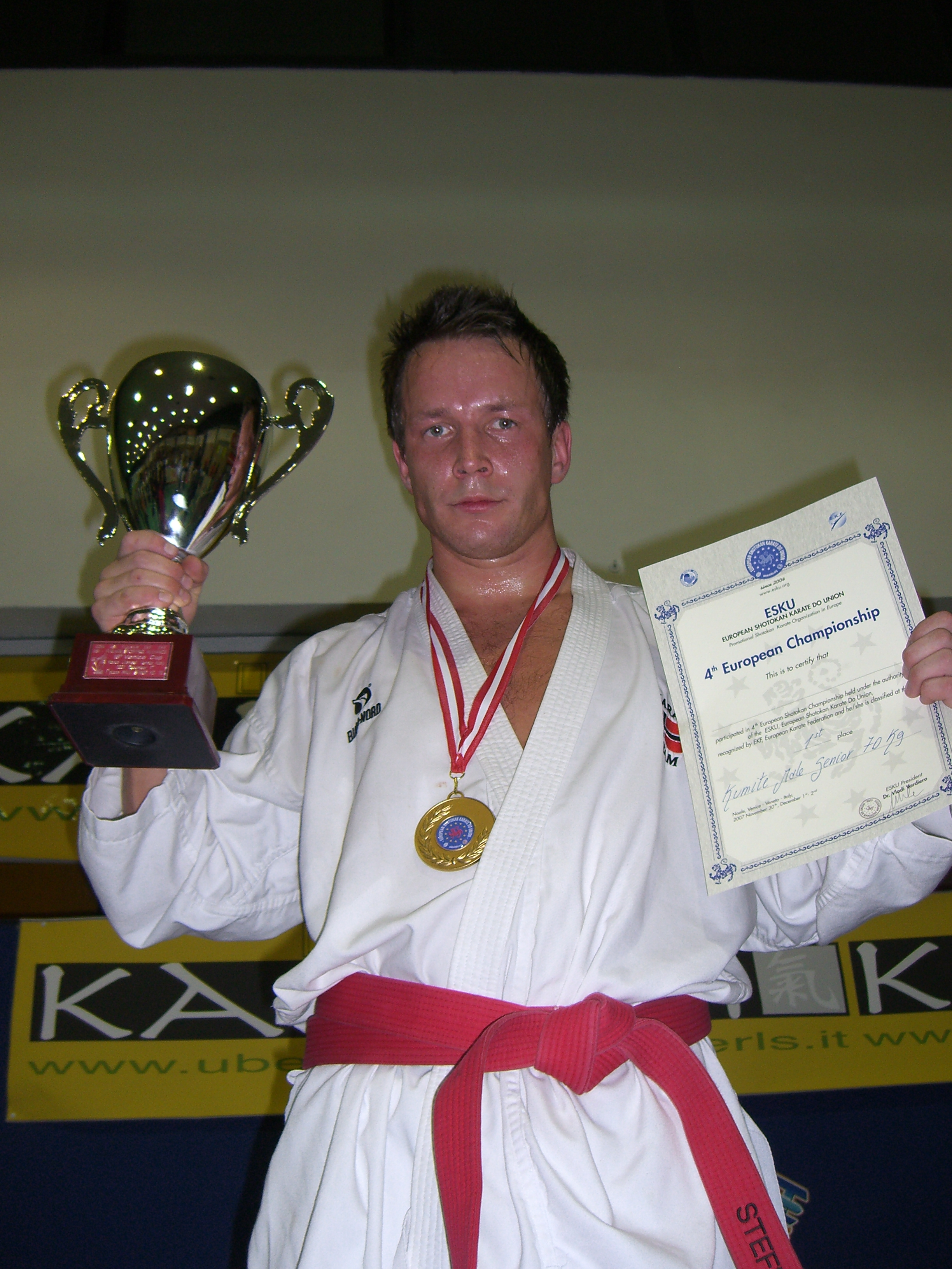 Steffen Larsen seier i Venezia Open